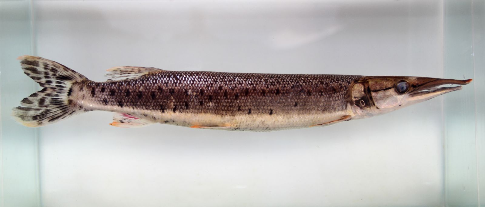 Ctenolucidae Boulengerella maculata